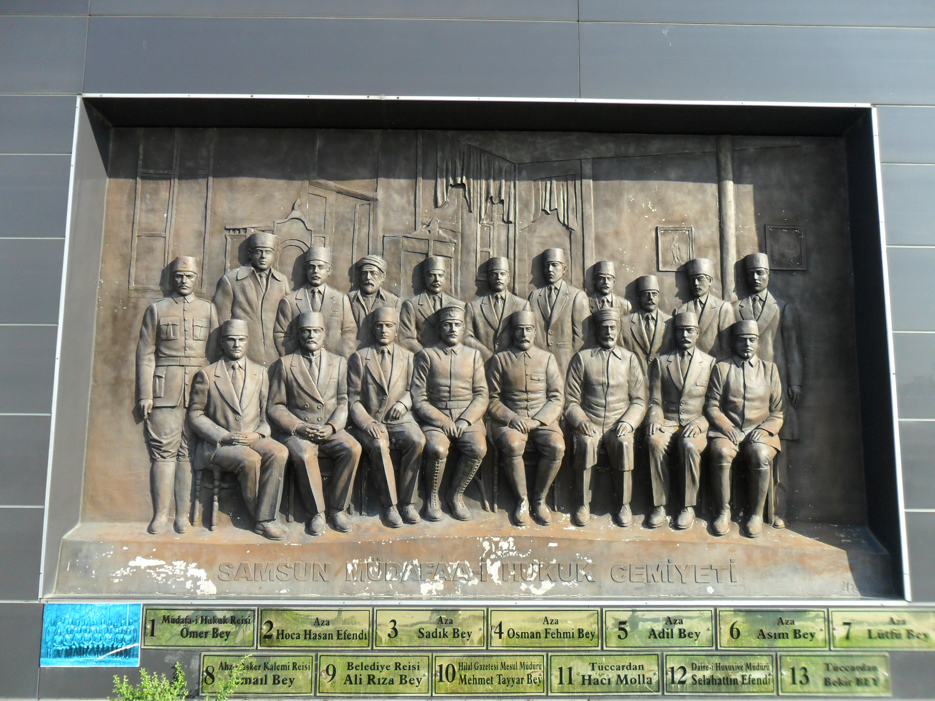 Uluslararası Yabancılar Pazarı'nın dış cephesinde bulunan Samsun Müdafaa-i Hukuk Cemiyeti kabartması.